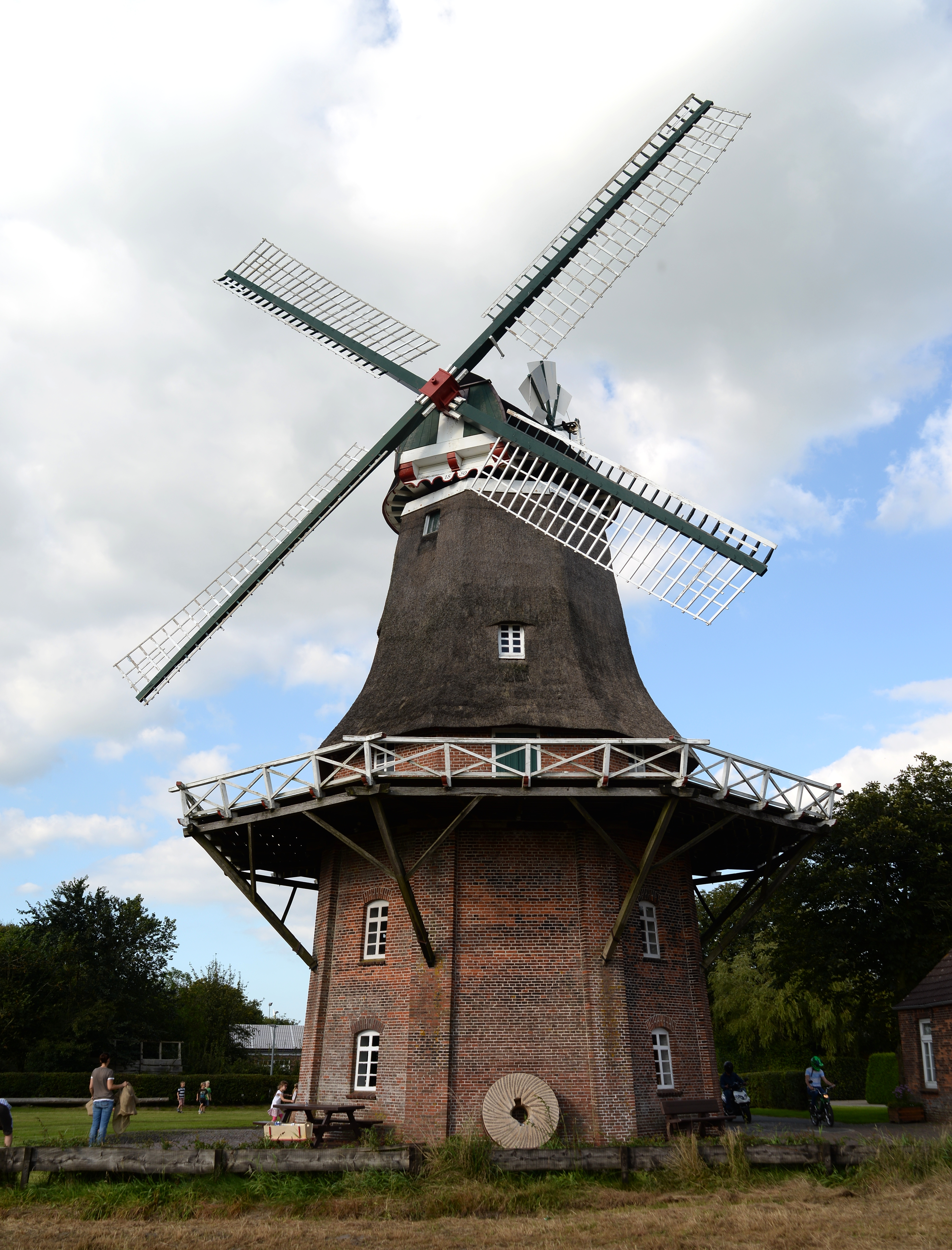 Windmühle in Westerholt, Osttfriesland This is a photograph of an architectural monument.It is on the list of cultural monuments of Westerholt